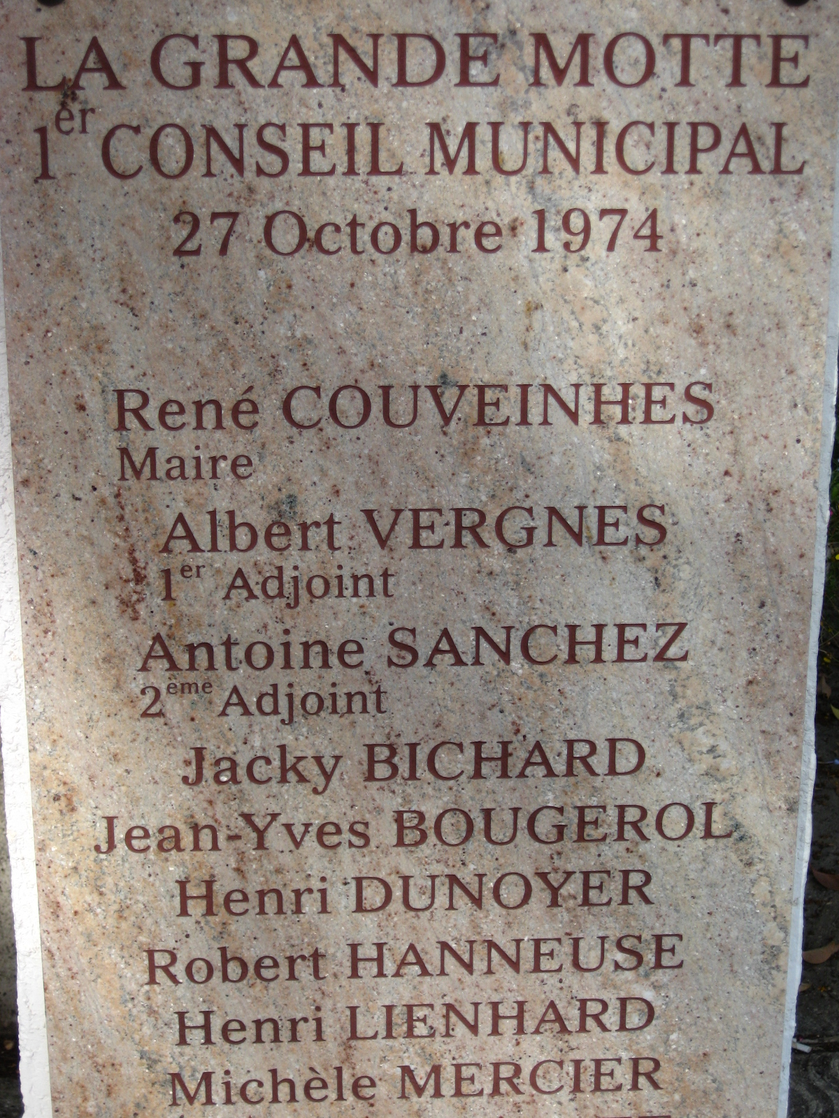 plaque commémorative La Grande-Motte 1er conseil municipal le 27/10/1974